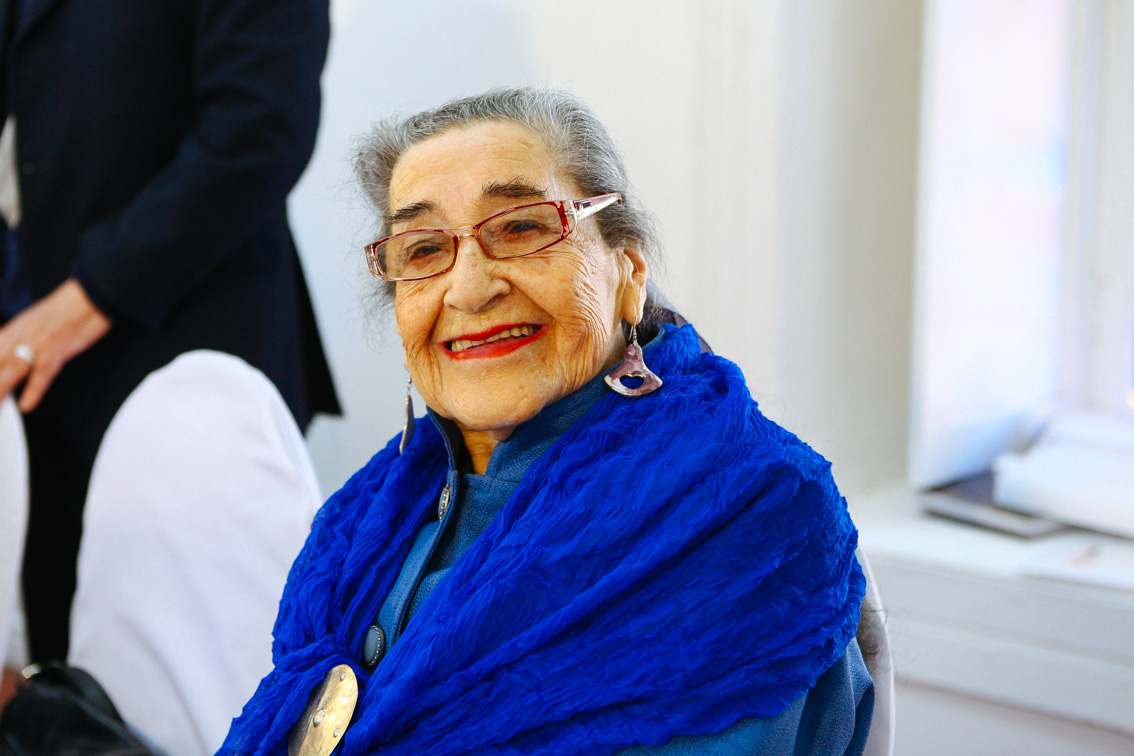 Premios nacionales dan su apoyo a Michelle 28/11/2013